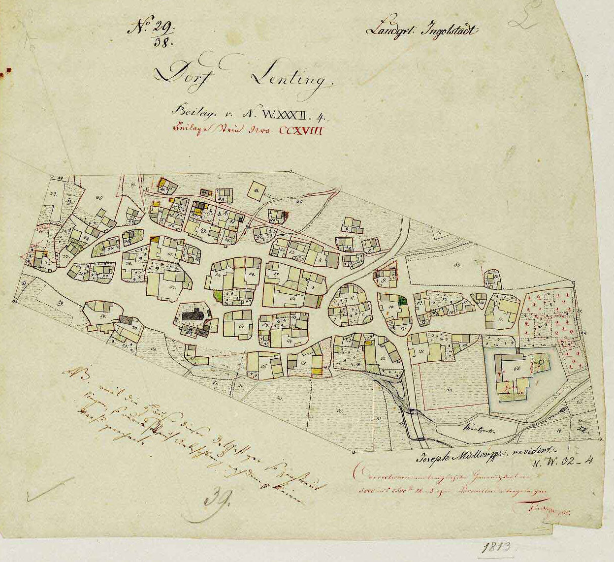 Historische Ortskarte von Lenting von 1813. Maßstab: 1:2500.